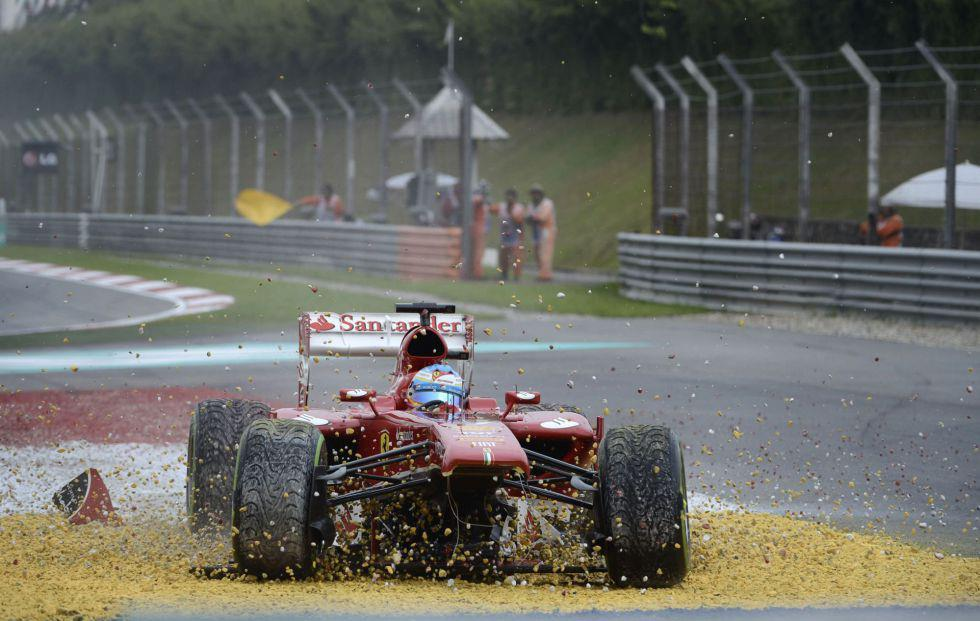 Fernando Alonso al GP de Malasia